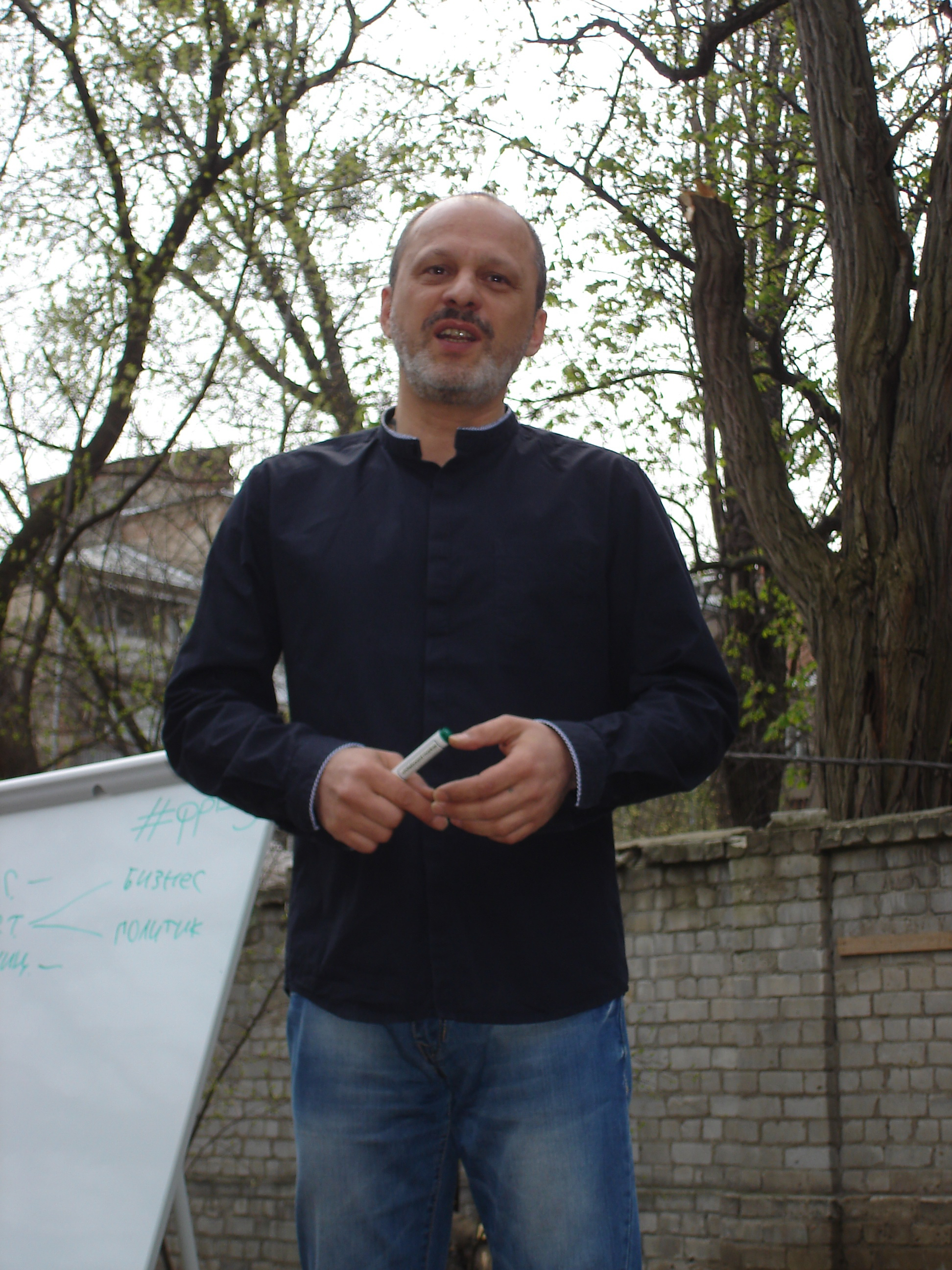 Зураб Аласанія — український журналіст під час проведення майстер-класу із журналістики у дворику Харківського літературного музею. Квітень 2013 року.(На час зйомки — власник та головний редактор харківського інтернет-видання MediaPort).